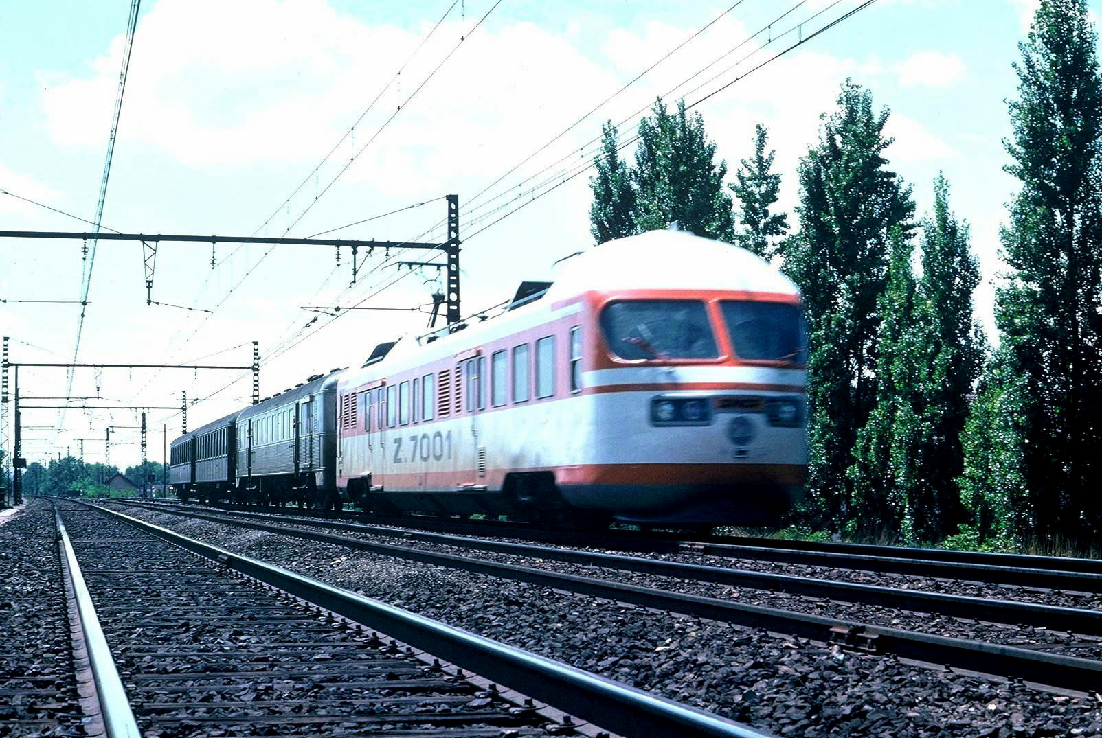 Photographie faite à Beaune (21)